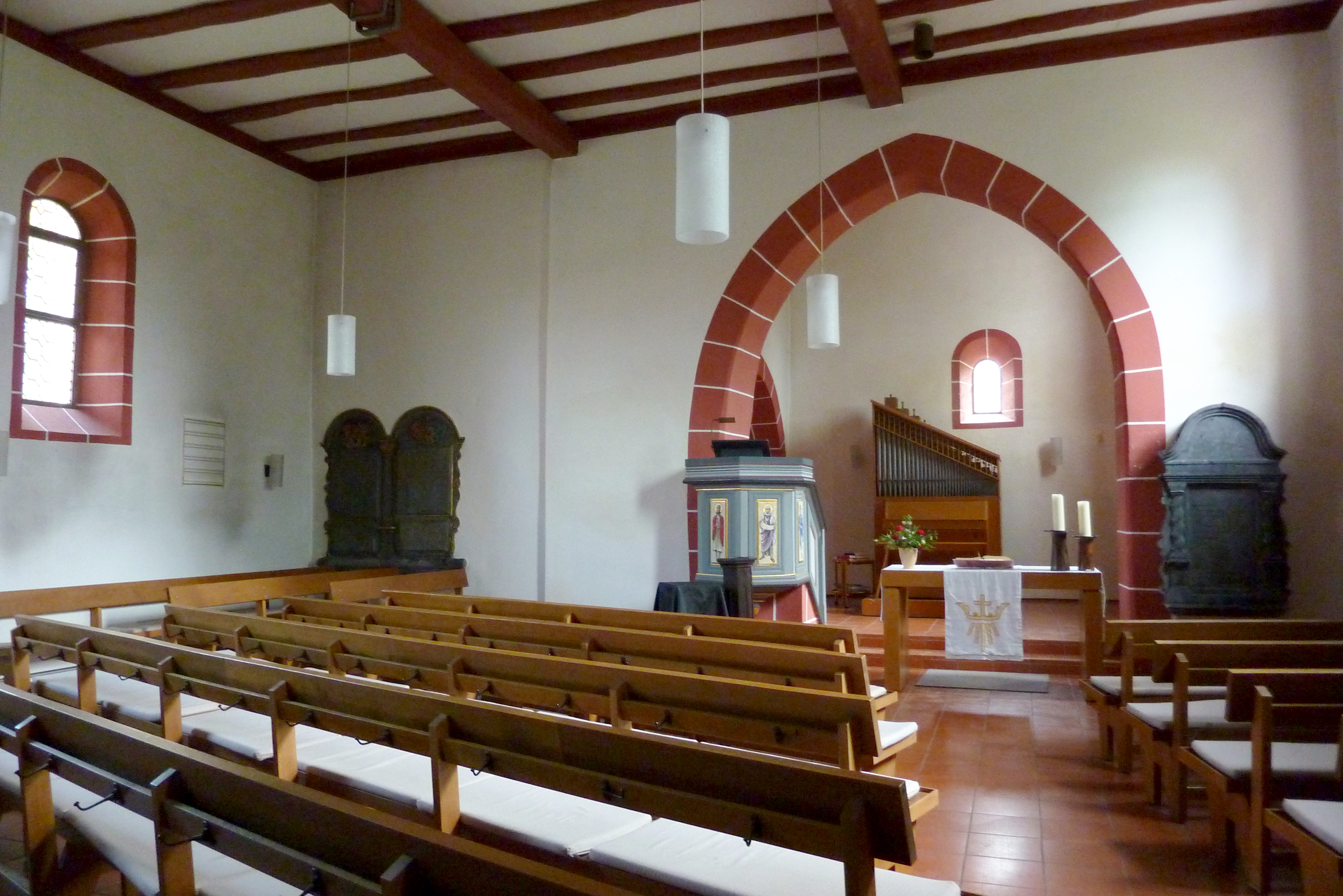 Evangelische Friedhofskirche St. Georgen, St.-Georg-Straße 19, Braunfels, Lahn-Dill-Kreis (Hessen), Innenraum mit Blick zum Chor